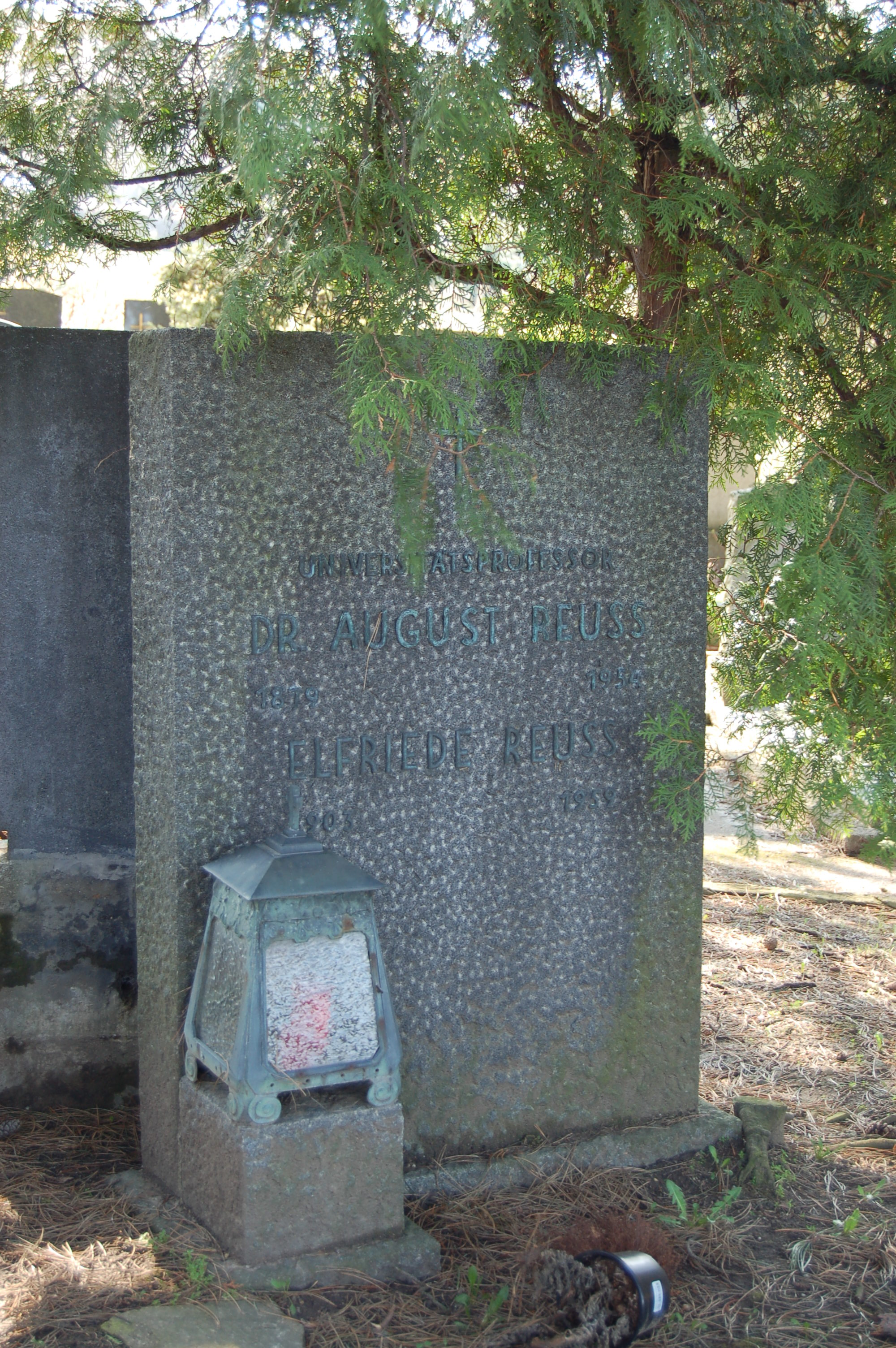 Neustifter Friedhof, Grabstätte von August Reuss (Ehrengrab der Stadt Wien)